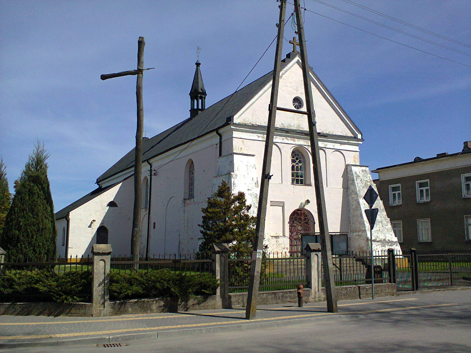 Kościół filialny pw. Narodzenia NMP w Wąsoszu